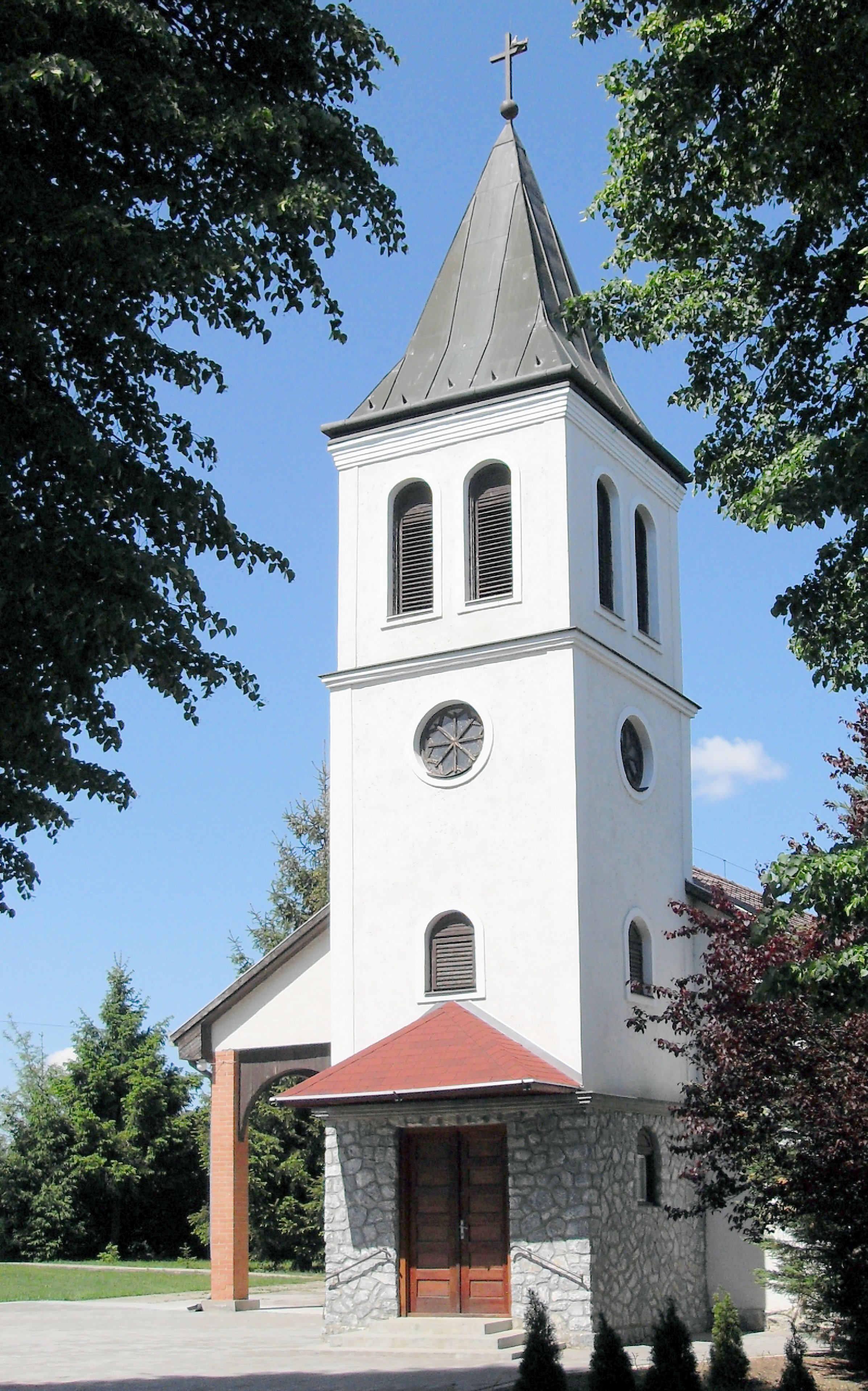 Romai katolikus templom Csobád